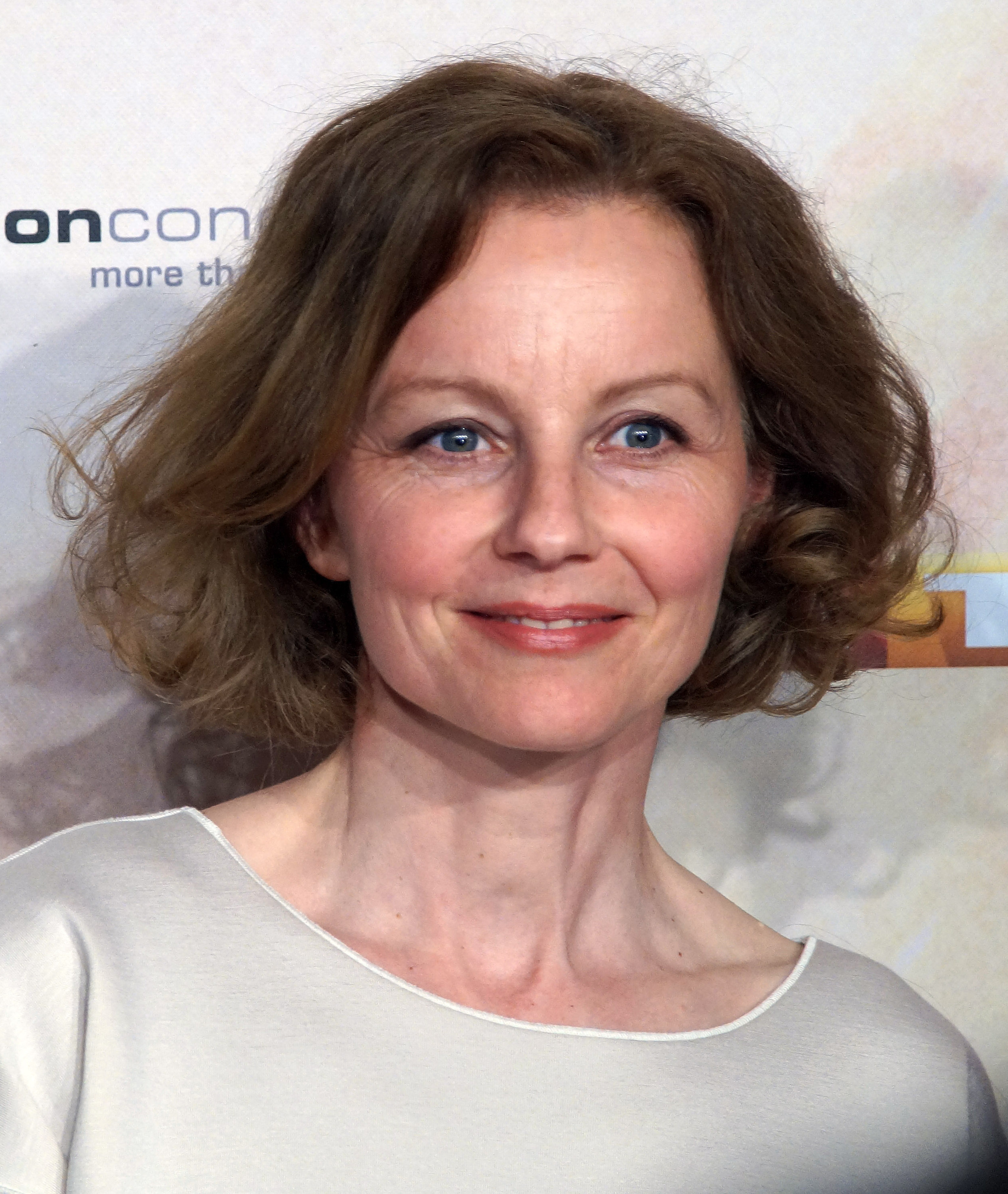 Carina Wiese bei der Premiere von der 300. Folge 'Alarm für Cobra 11', April 2016.